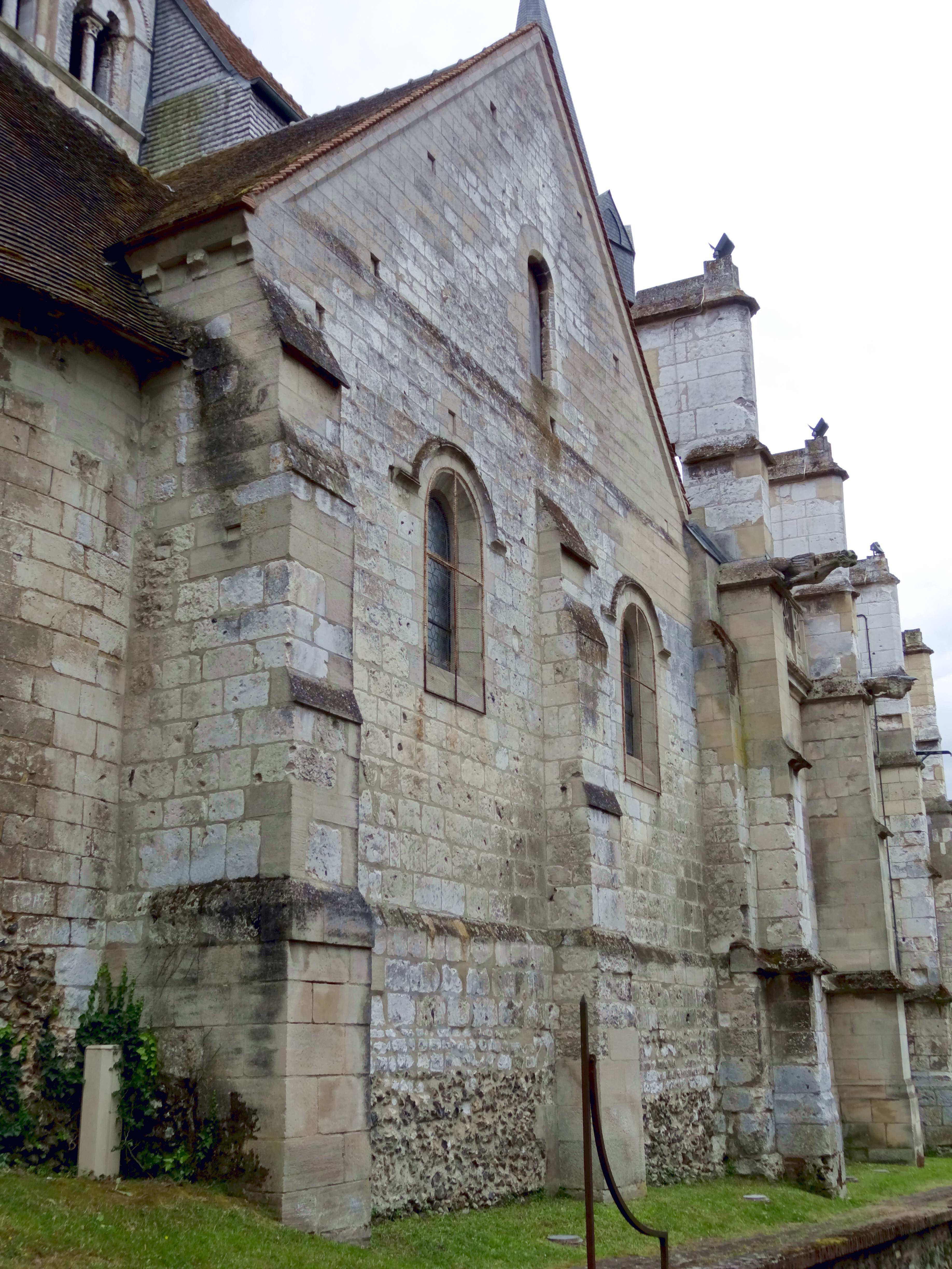 Église Notre-Dame de Marissel - voir titre.